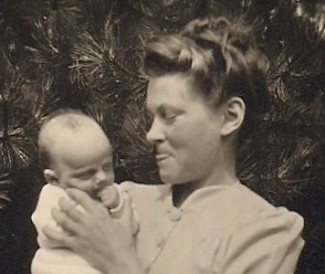 Die Hochfrisur war 1941durchaus modern